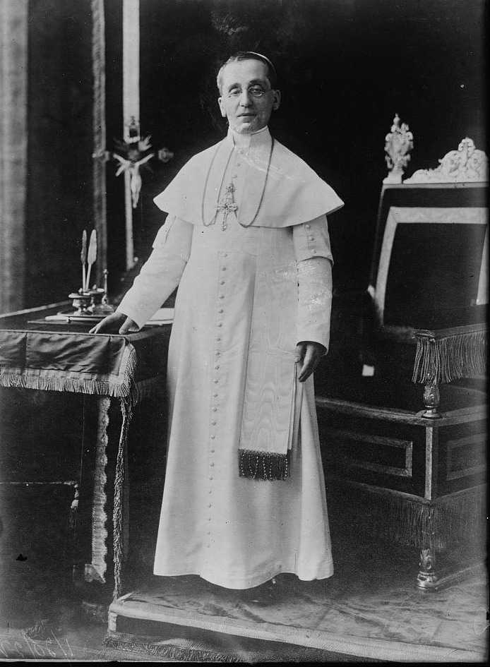 Benedictus XV